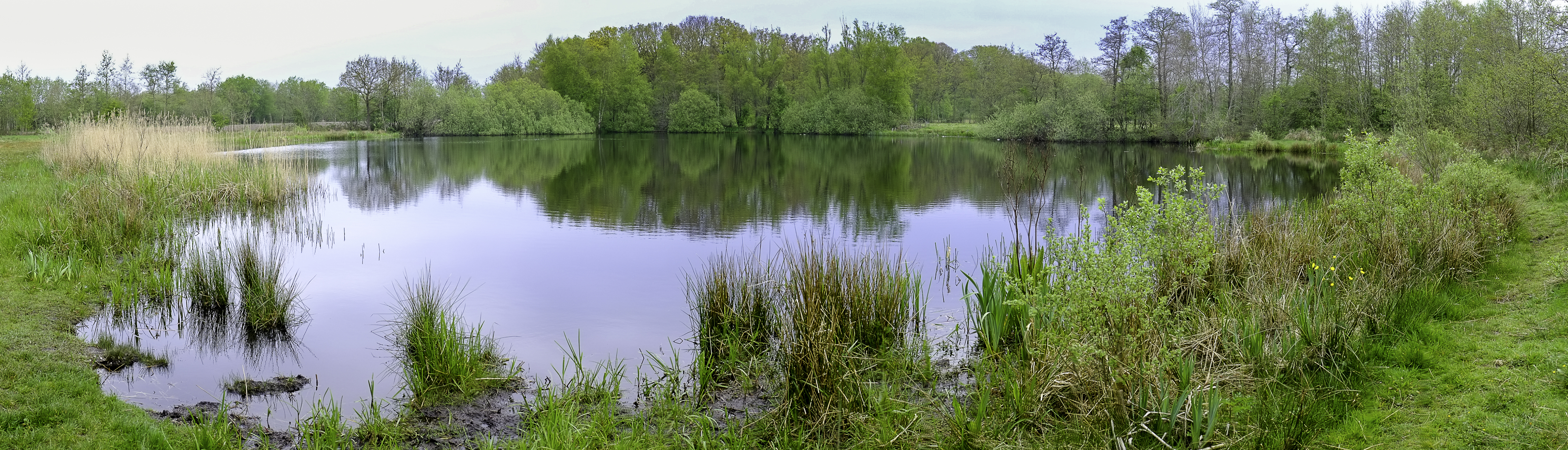 Hamstrapoel